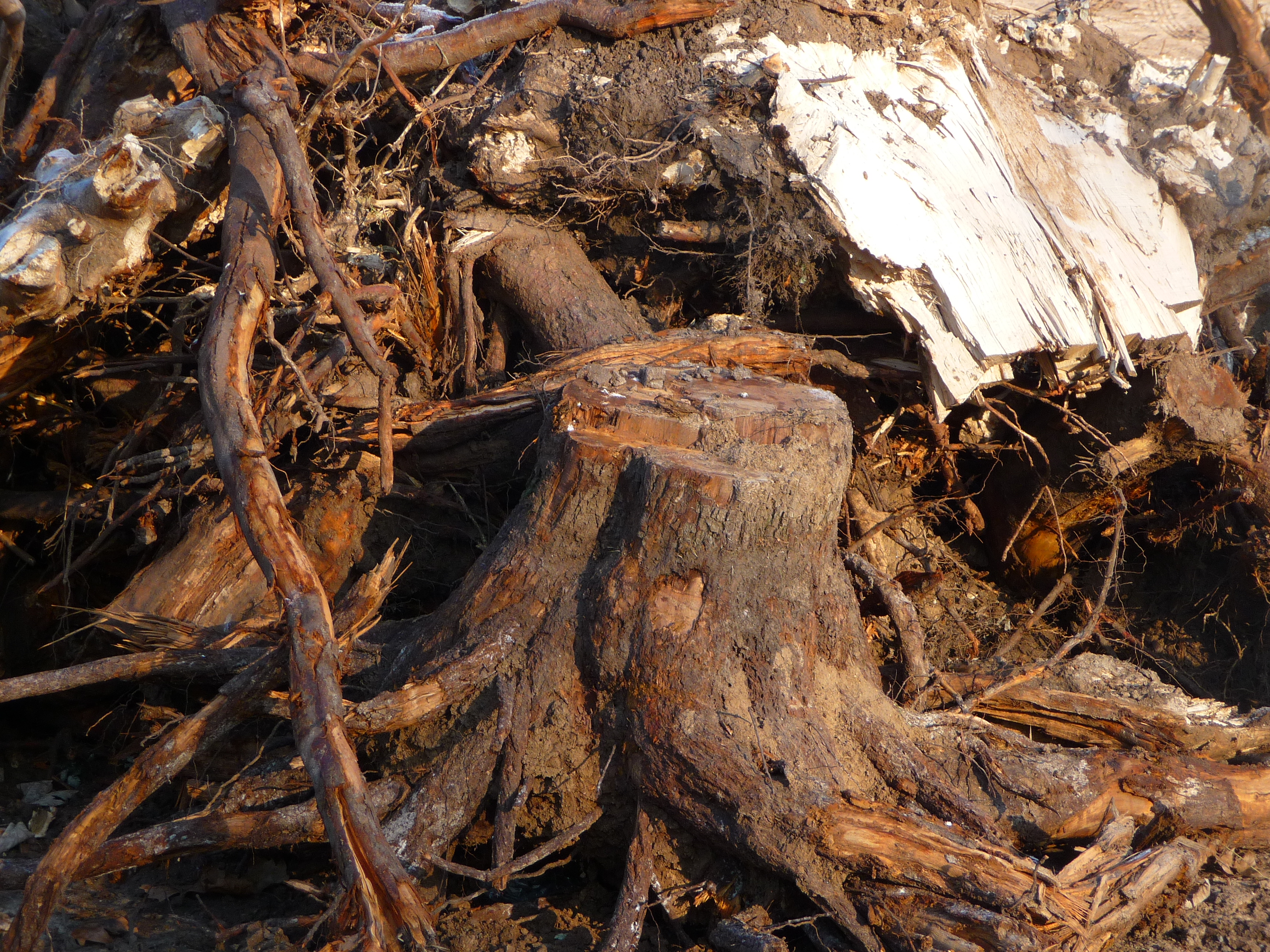 auf Baugrundstück ausgegrabener Baumstumpf, daneben weiteres Totholz